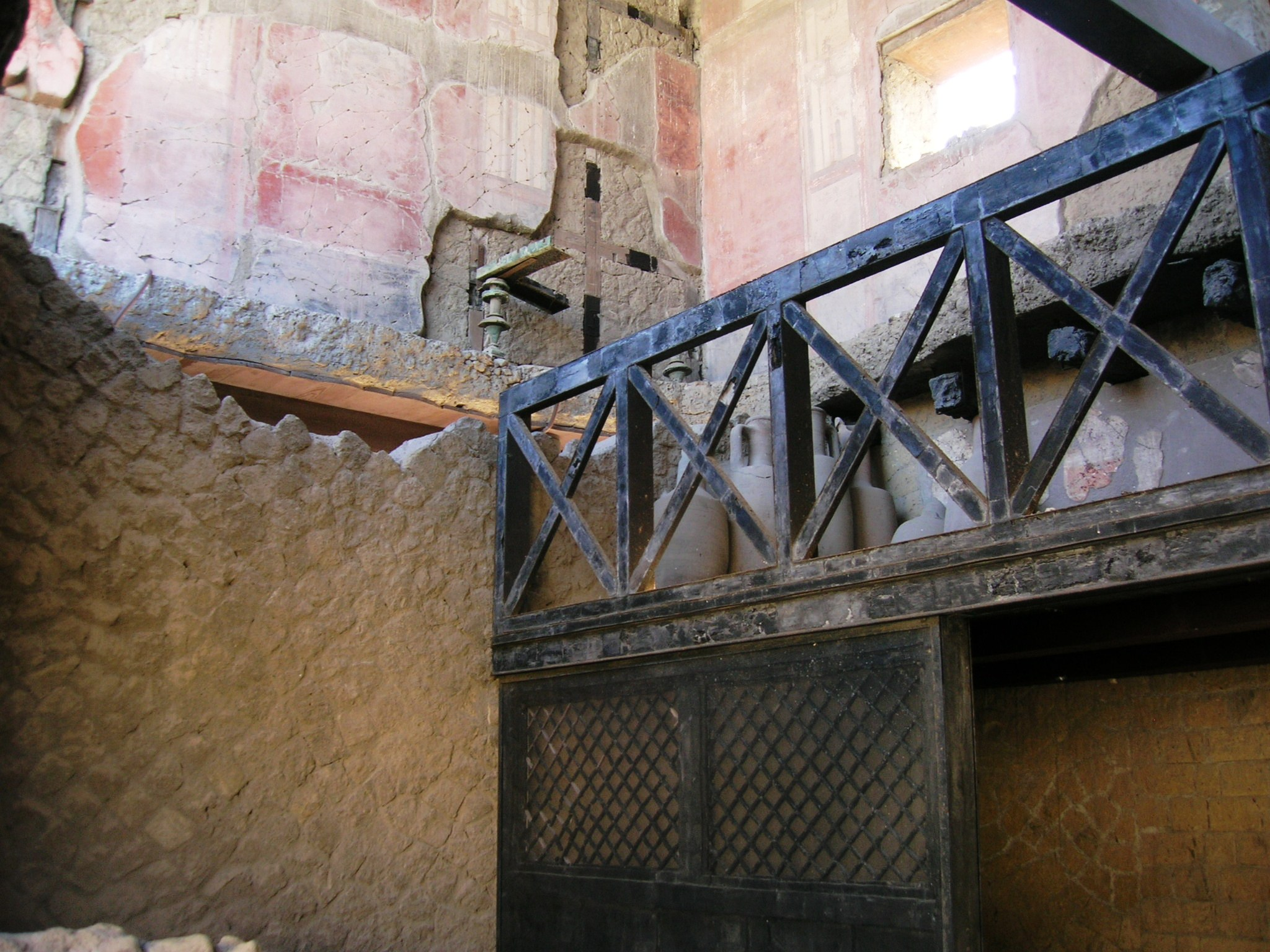 Casa di Nettuno e Anfitrite